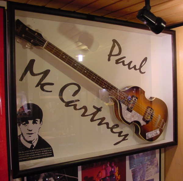 Ein handsignierter Linkshänder-Höfner-Bass von Paul McCartney im Beatles-Museum Biebelnheim